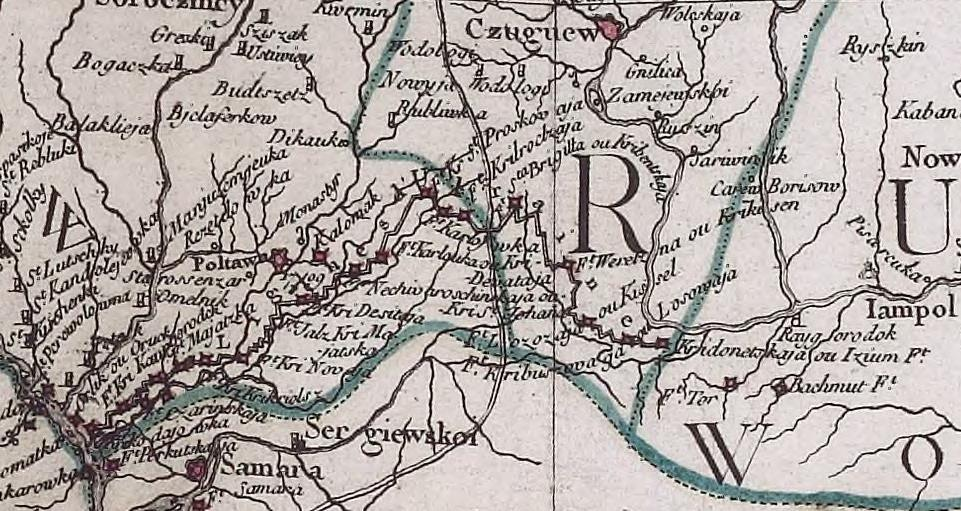 Украинская линия. Фрагмент из Карты территории военных действий между Россией, Турцией и Речью Посполитой, составленной на французском языке в 1769 году.